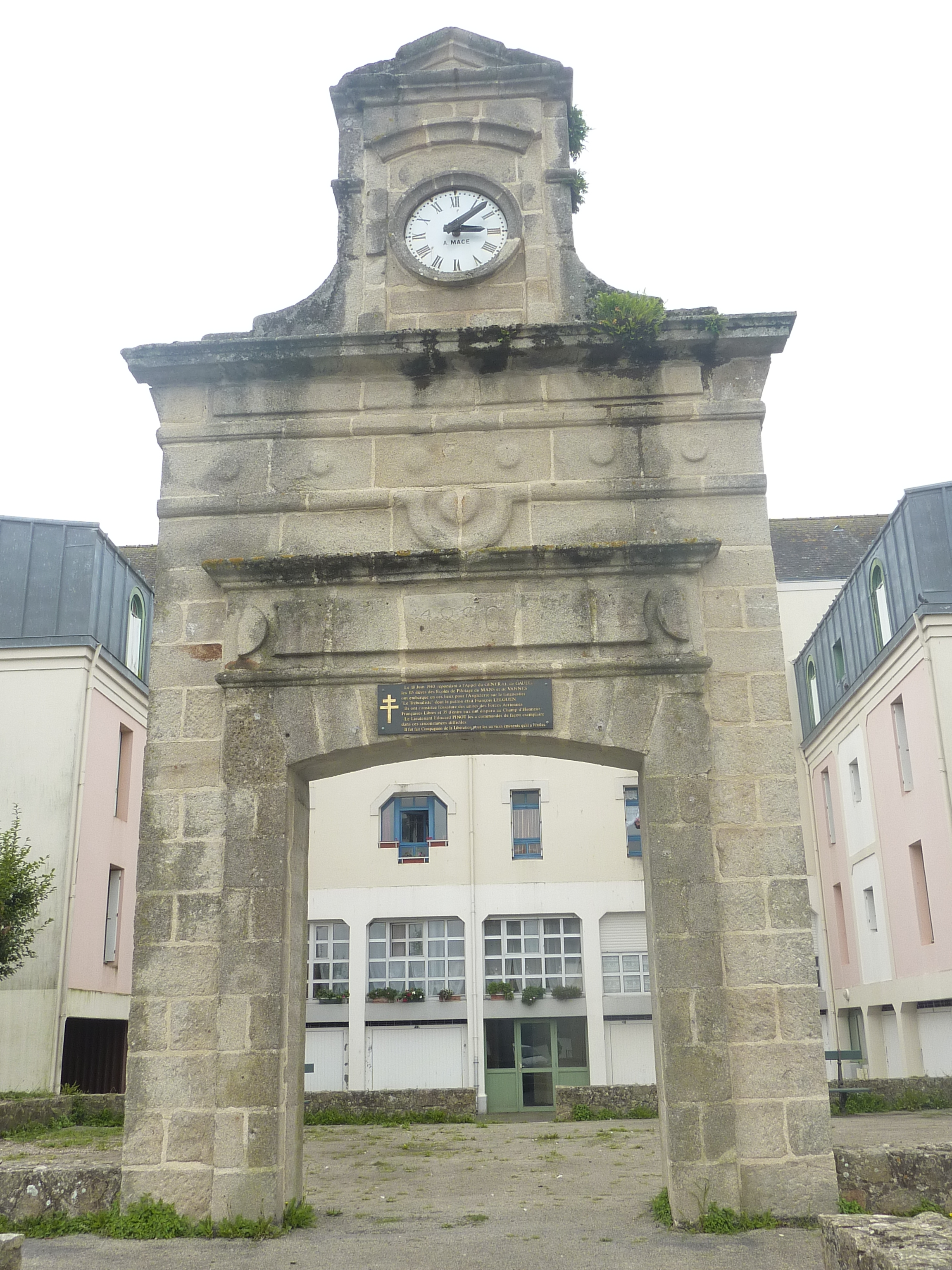 Douarnenez: la porte monumentale de la glacière le long des quais du port du Rosmeur. Elle date de 1890 et c'est le seul vestige du lieu où se fabriquait et se chargeait la glace chargée à bord des bateaux de pêche pour la conservation du poisson. Cette porte porte une inscription à la mémoire des Français libres embarqués sur le Trébouliste le 18 juin 1940.